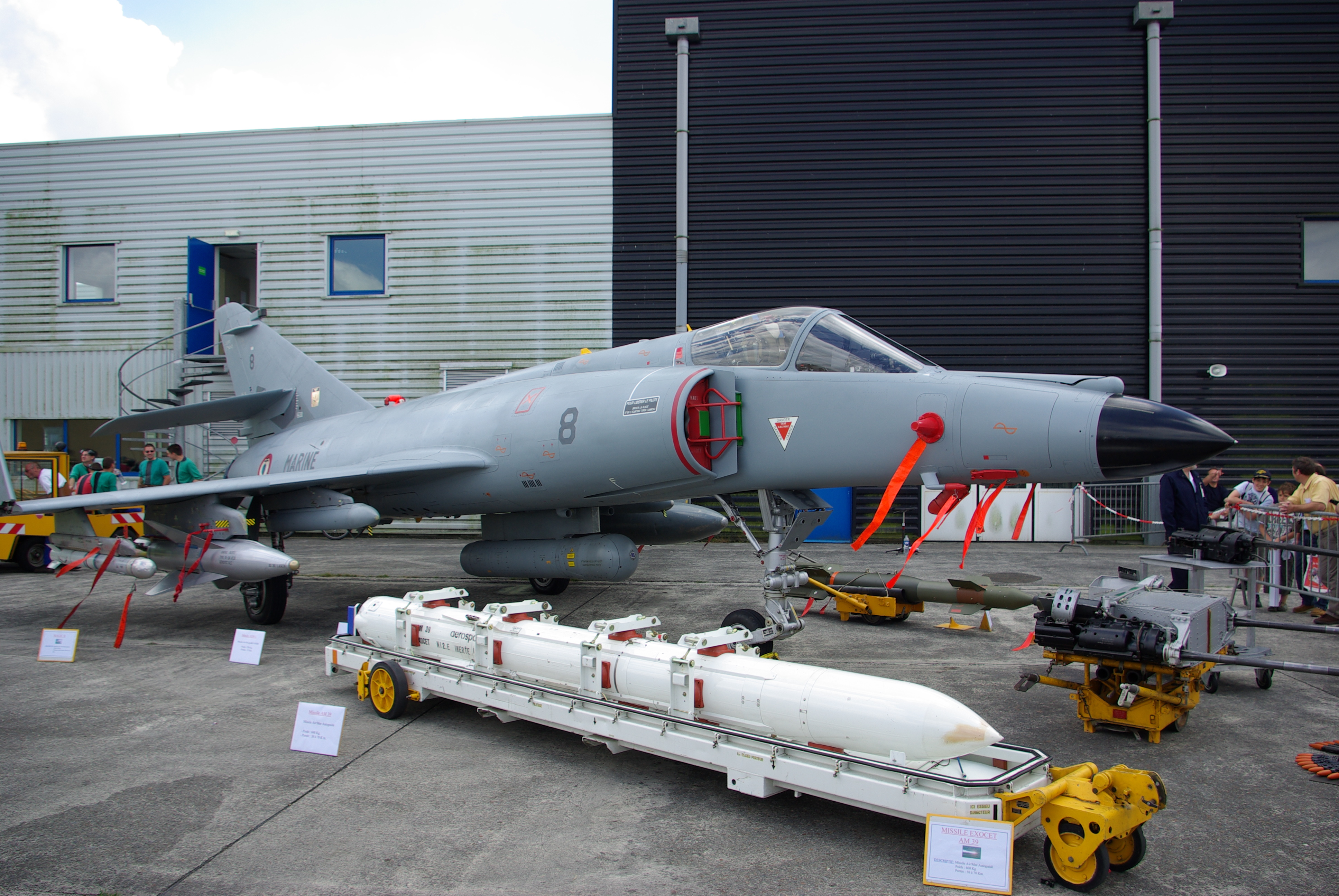 Super Étendard exposé avec son armement : AM-39 Exocet, DEFA 552A, AS30L, bombe guidée laser...